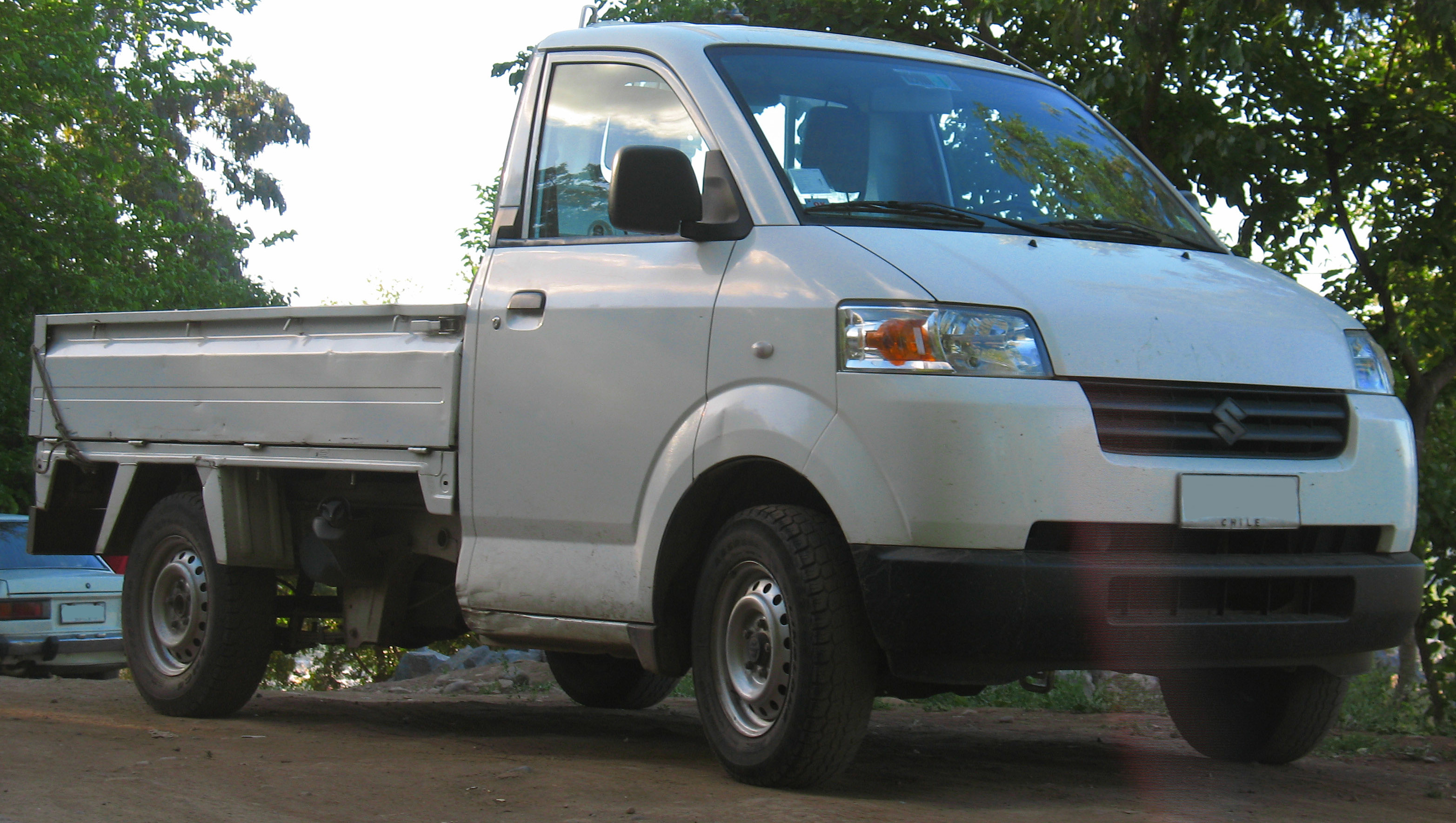 Suzuki APV 1.6 Pick up 2008